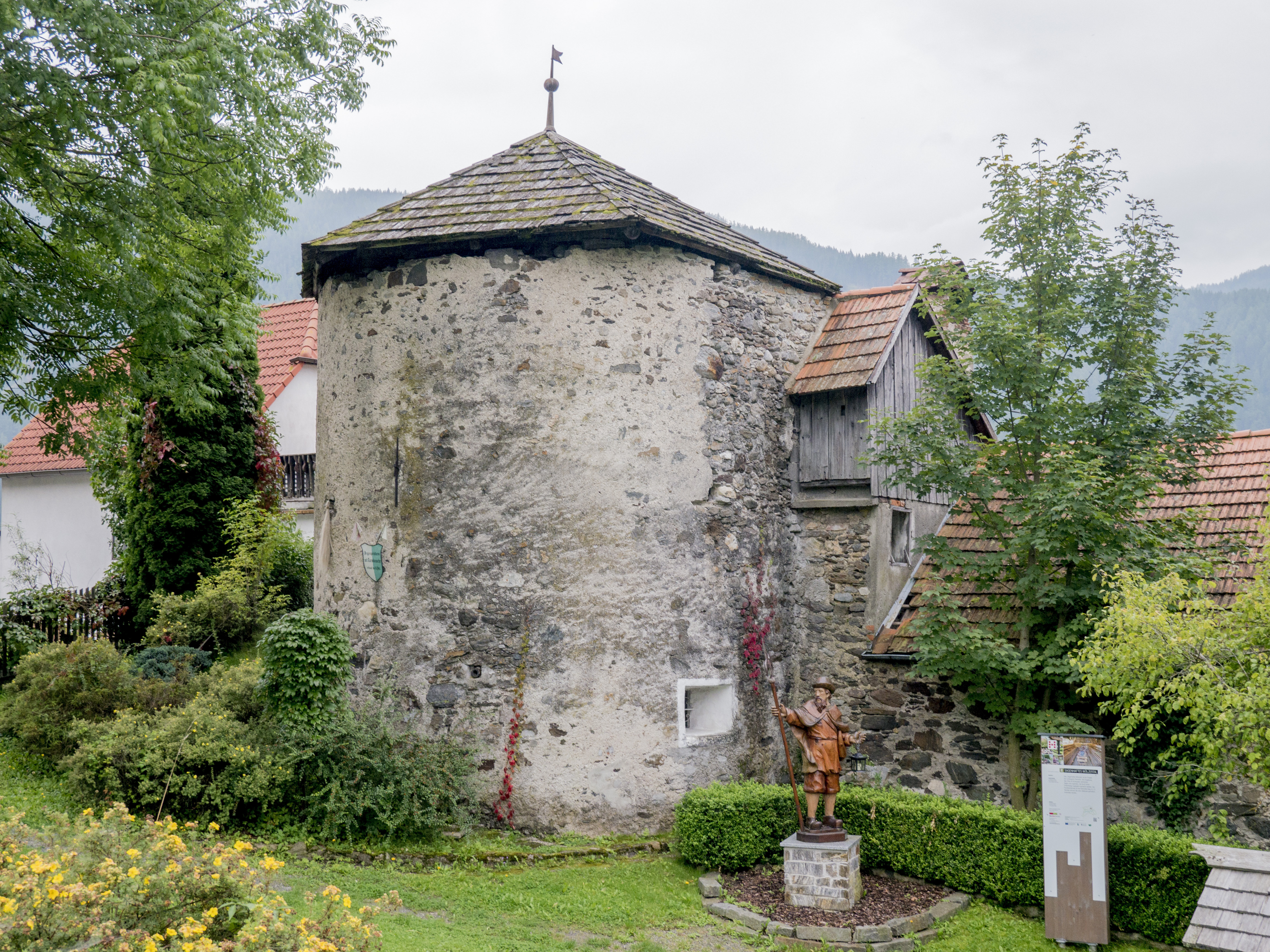 Peggesbichlturm (Käsbichlturm) mit Turmkeusche